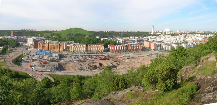 Före detta Lugnets industriområde, Södra Hammarbyhamnen, Stockholm, numera en del av Hammarby Sjöstad. Former Lugnet industrial area (Lugnets industriområde) Stockholm, Sweden, now part of Hammarby Sjöstad area.